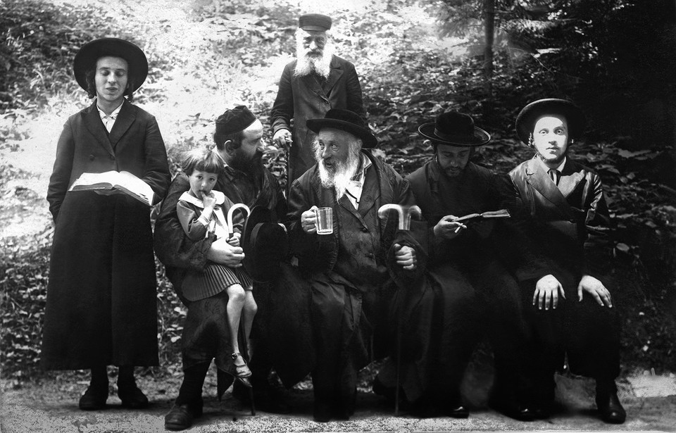 Synaj Halberstam (siedzi w centrum)